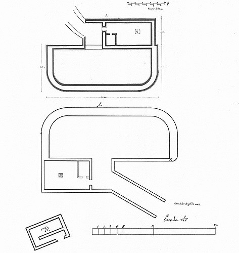 Fortificação do San Tiago em GUAM - Construção Espanhola An Spanish Building, made by spanish empire during the century 18